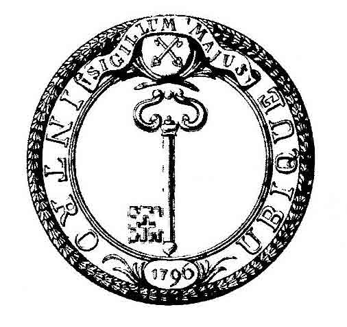 Sigillum Maius Senatus Intro Ubique